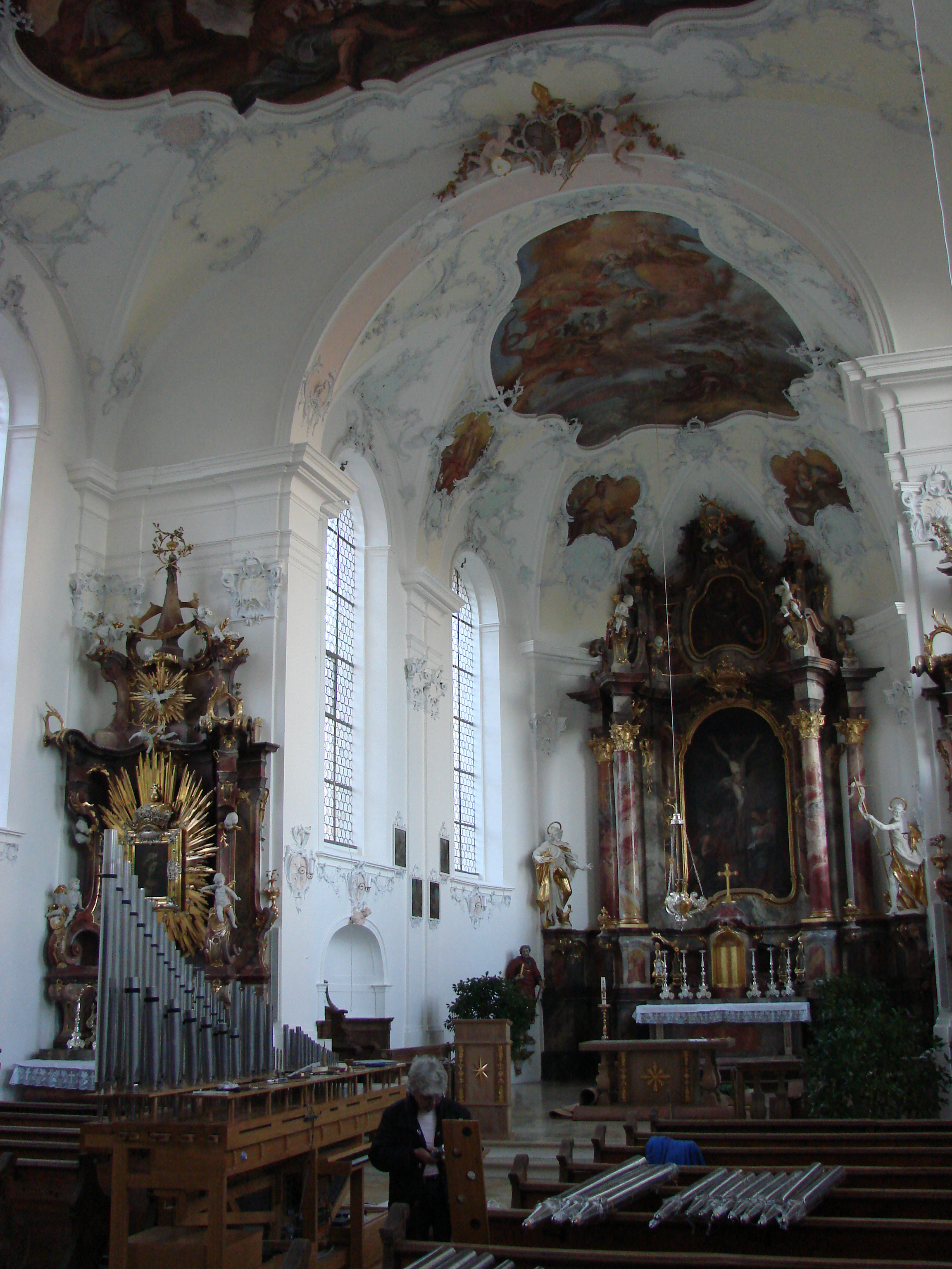 Pfarrkirche St. Johann Baptist, Wessobrunn